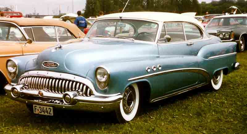 1953 Buick Super Riviera Series 50 Model 56R 2-door Hardtop